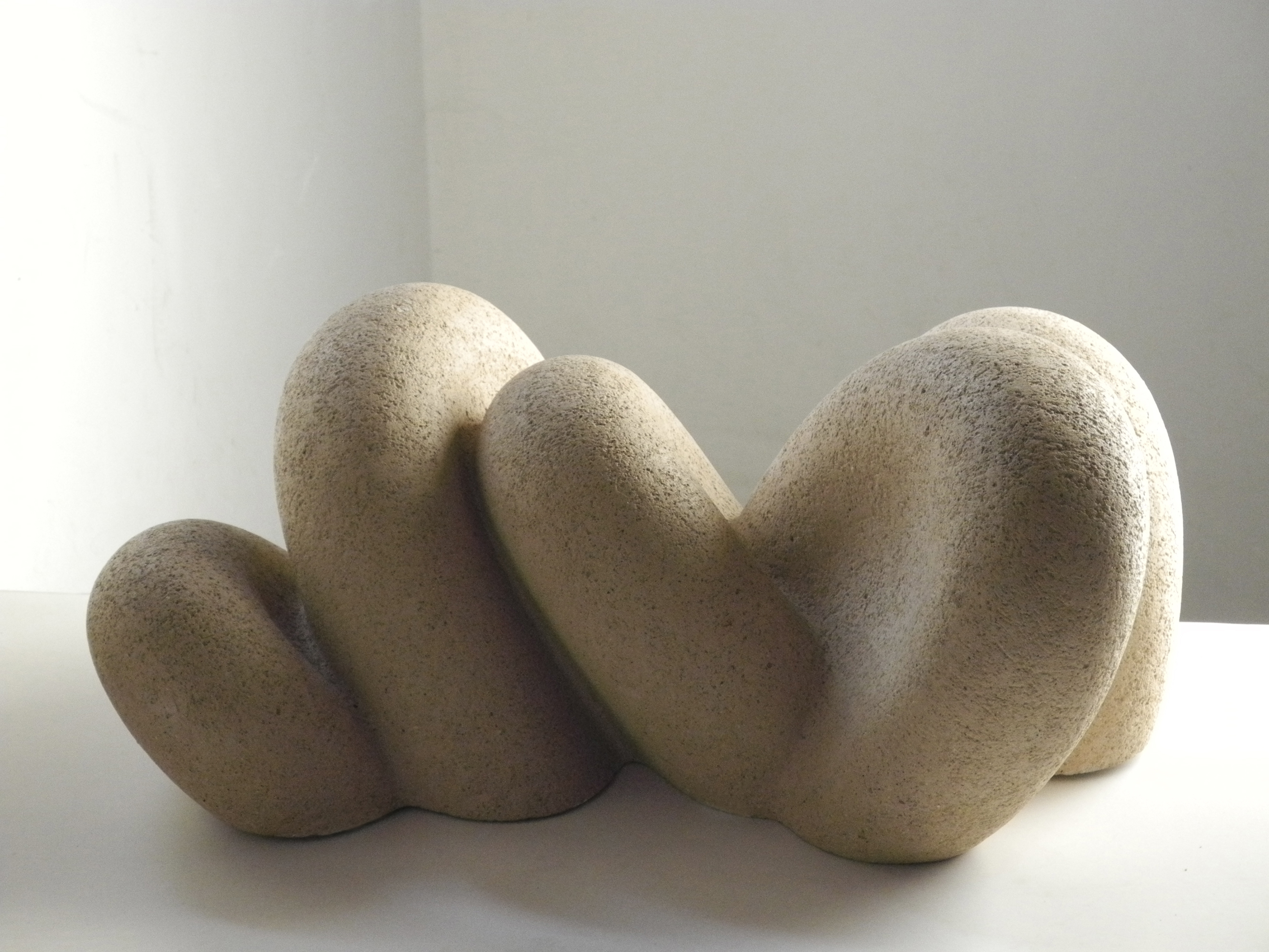 Ritam, 1984, Terakota